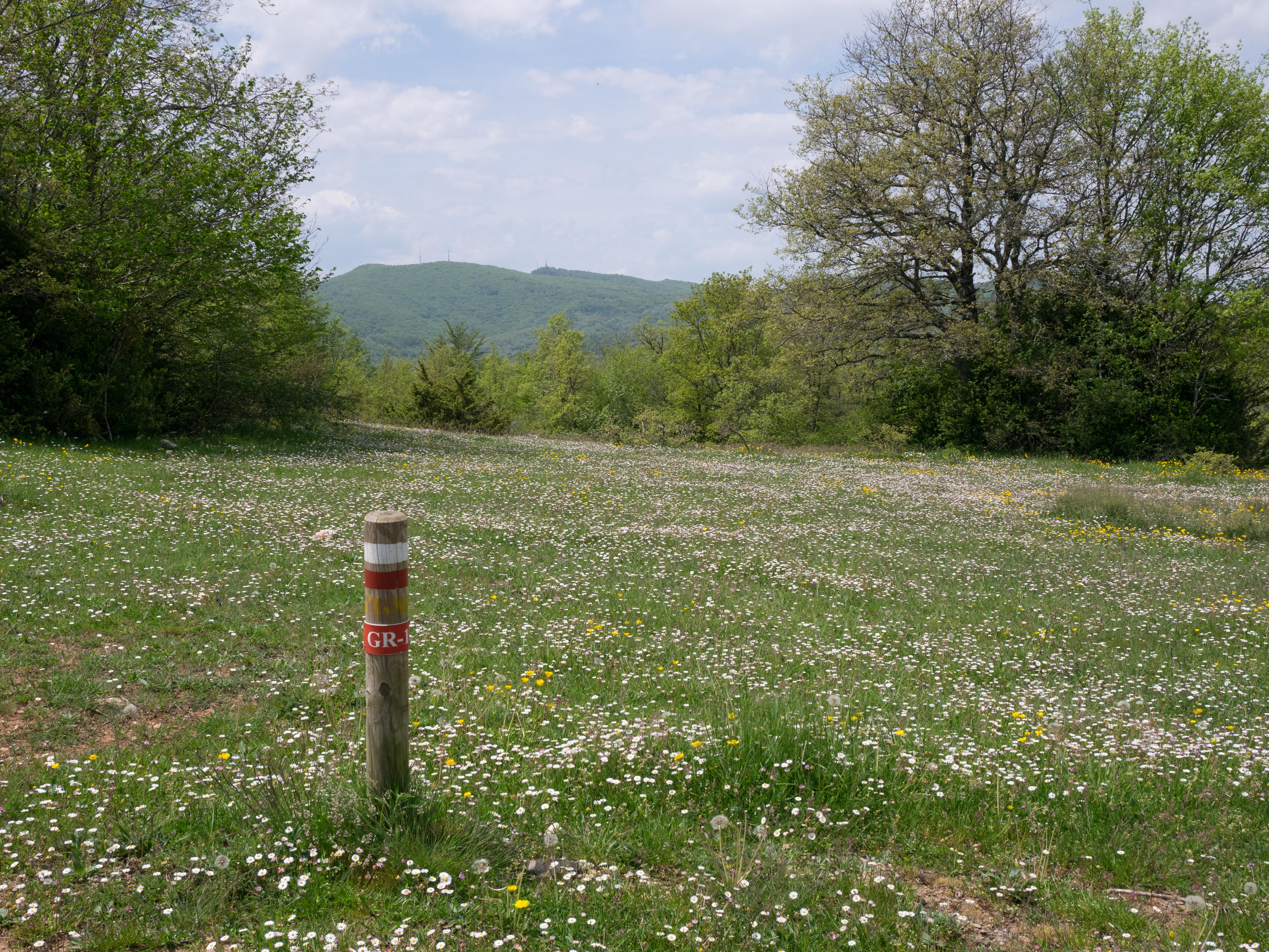 Marca del camino GR1 "Sendero Histórico". Álava, País Vasco, España